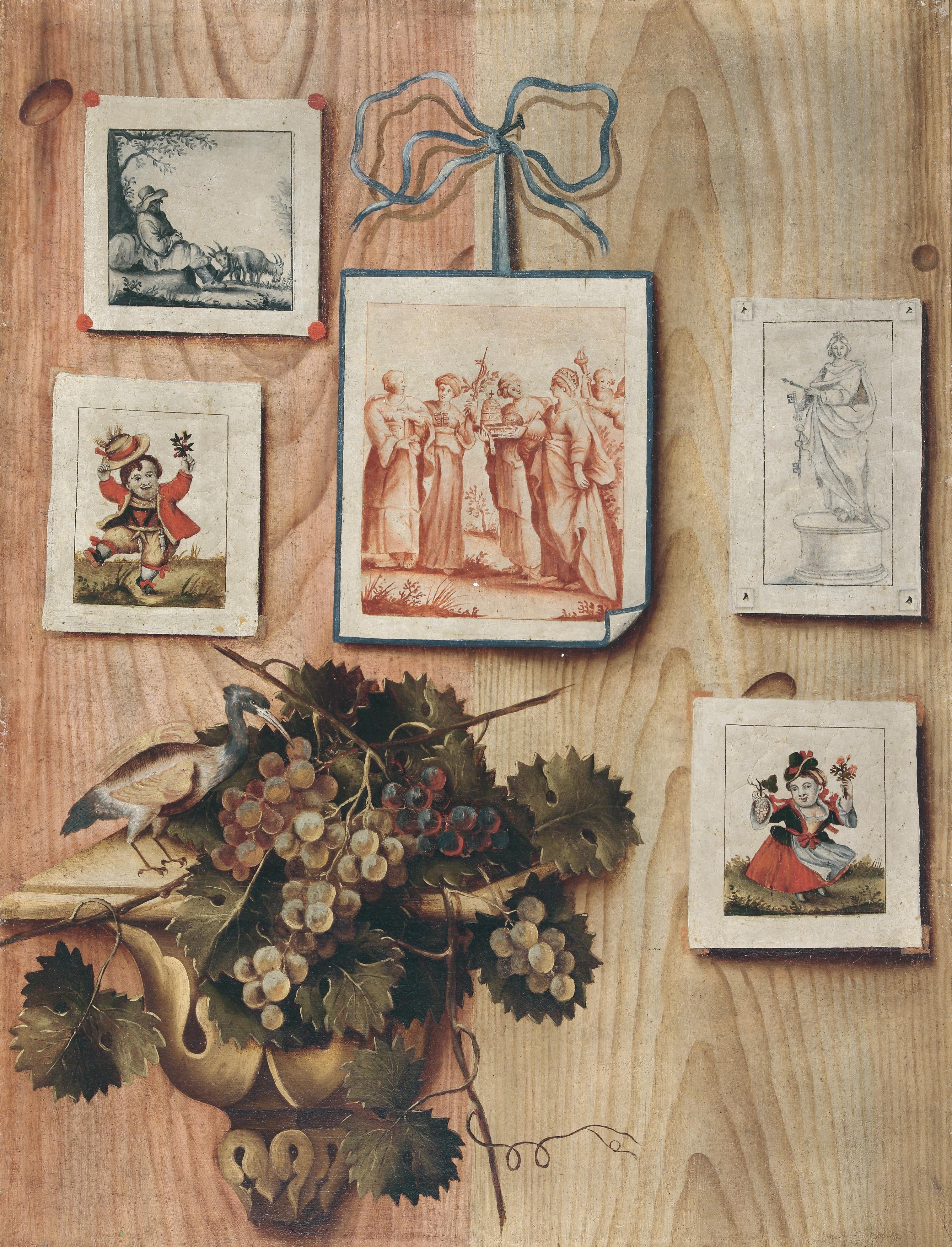 Trompe l’Oeil mit aufgeklebten Zeichnungen und Kupferstichen